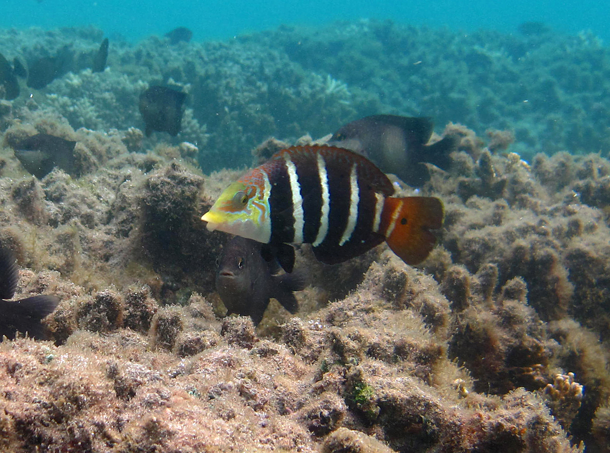 Un tamarin à bandes (Hemigymnus fasciatus) à la Réunion.